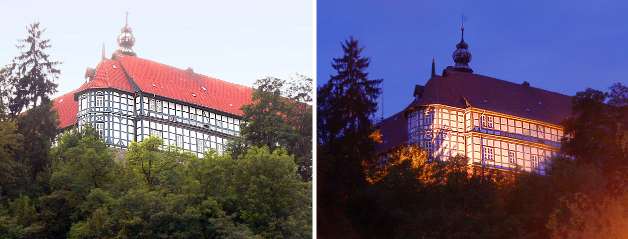 Schloss Herzberg vom Stadtzentrum aus gesehen, Tag- und Nachtvergleich